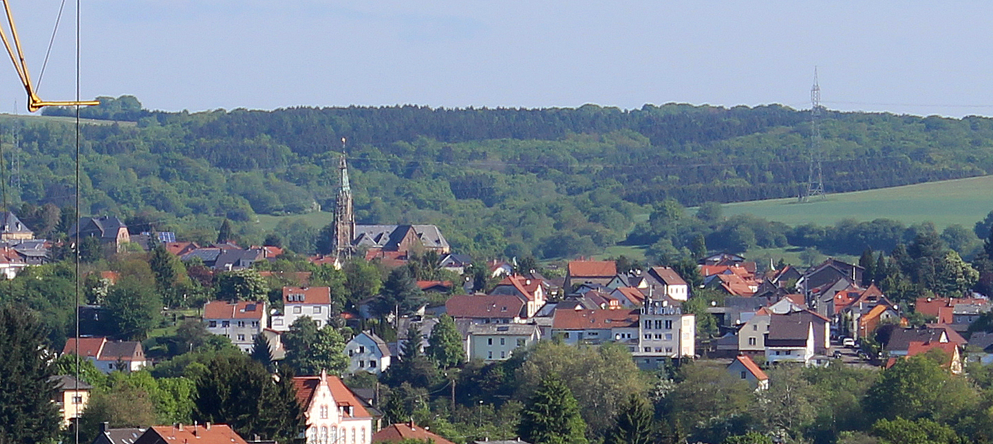 Blick auf Schiffweiler, Landkreis Neunkirchen, Saarland